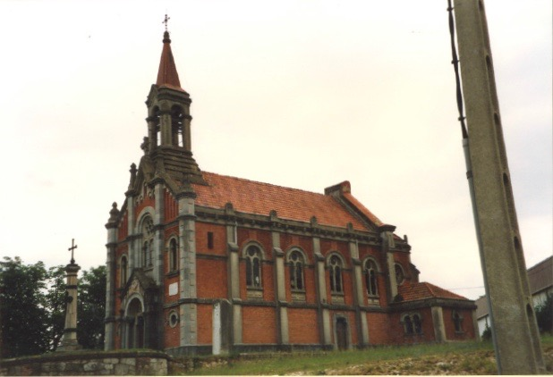 Capilla de Santa Bárbara en Coruño, Llanera. Construida entre 1913-1917 por la Sociedad Santa Bárbara de Cayés